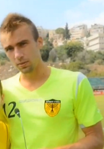 שמואל קוזוקין במדי בית"ר ירושלים